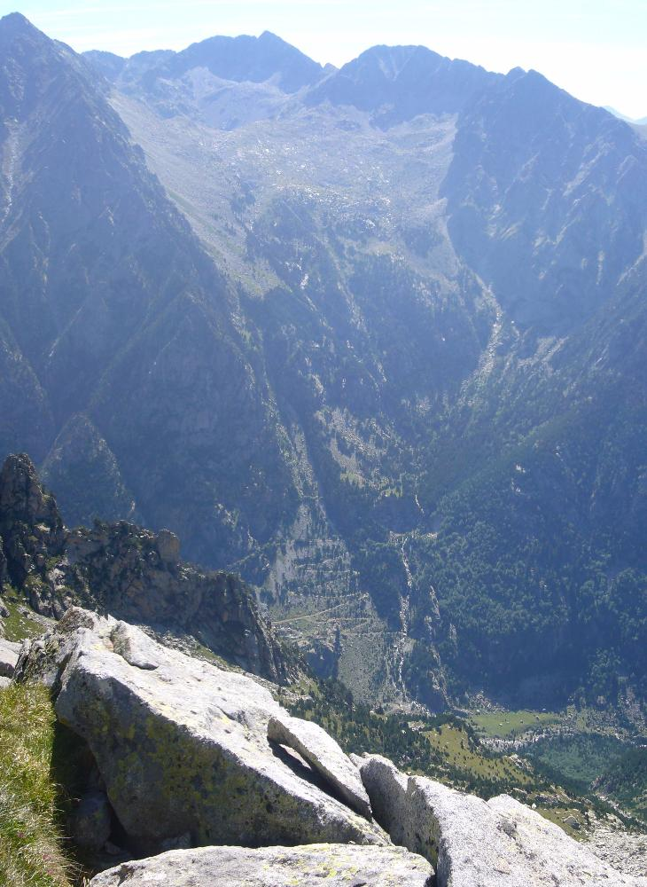 Circ i barranc de la Vall de Comalesbienes, vistos des del Barranc de Comaloforno; la Vall de Boí, Alta Ribagorça, Catalunya